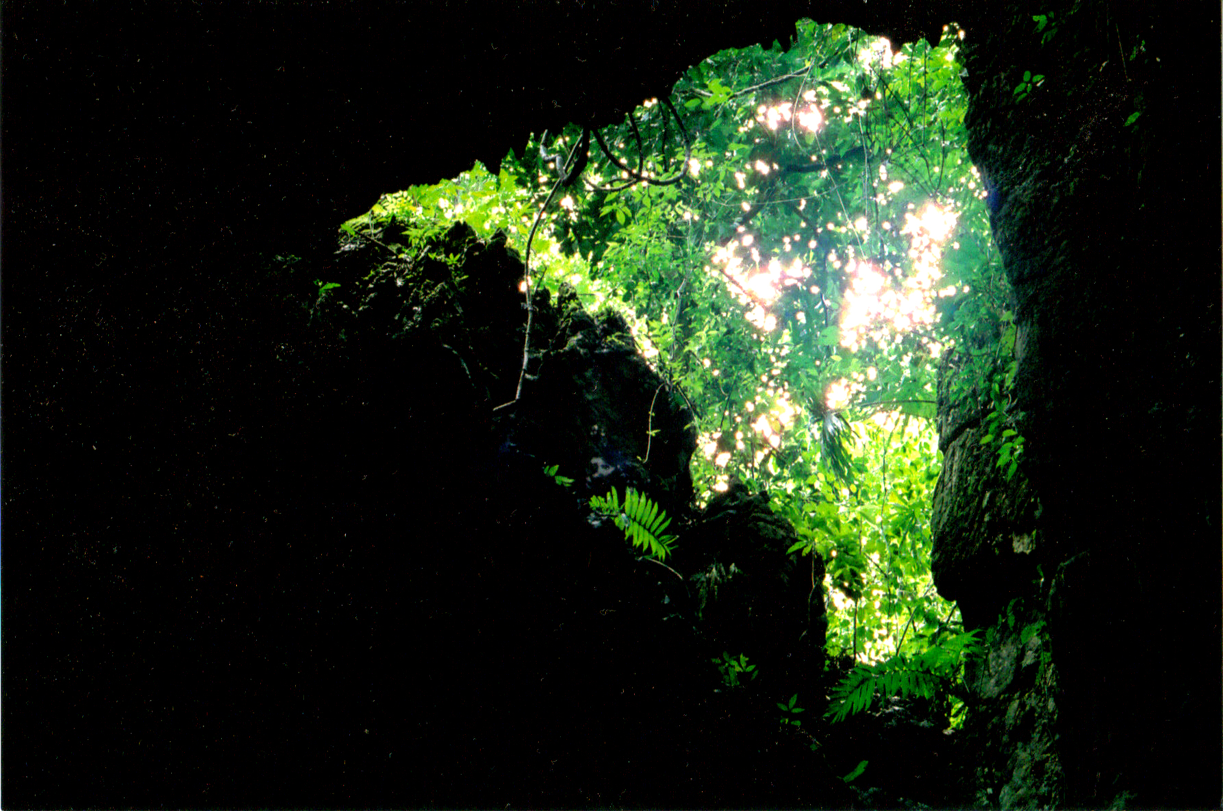 Interior de las grutas del Coconá en Tabasco, México.